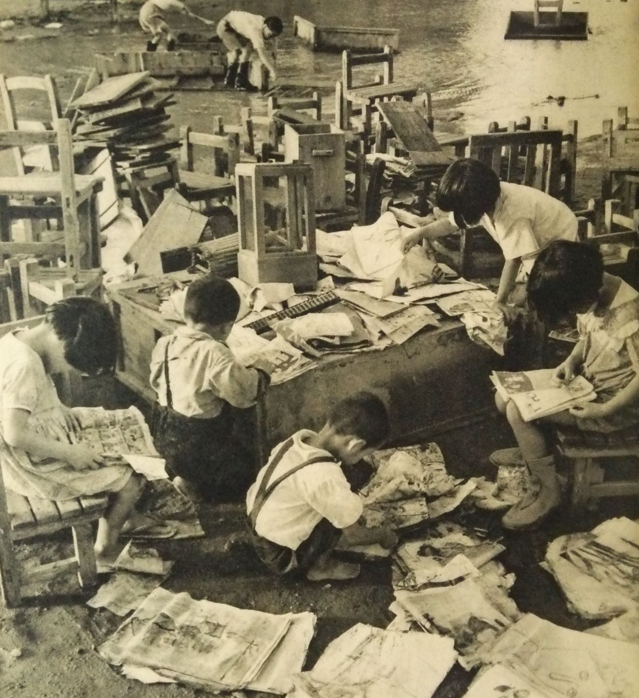 昭和28年西日本水害の際の福岡県朝倉郡蜷城村